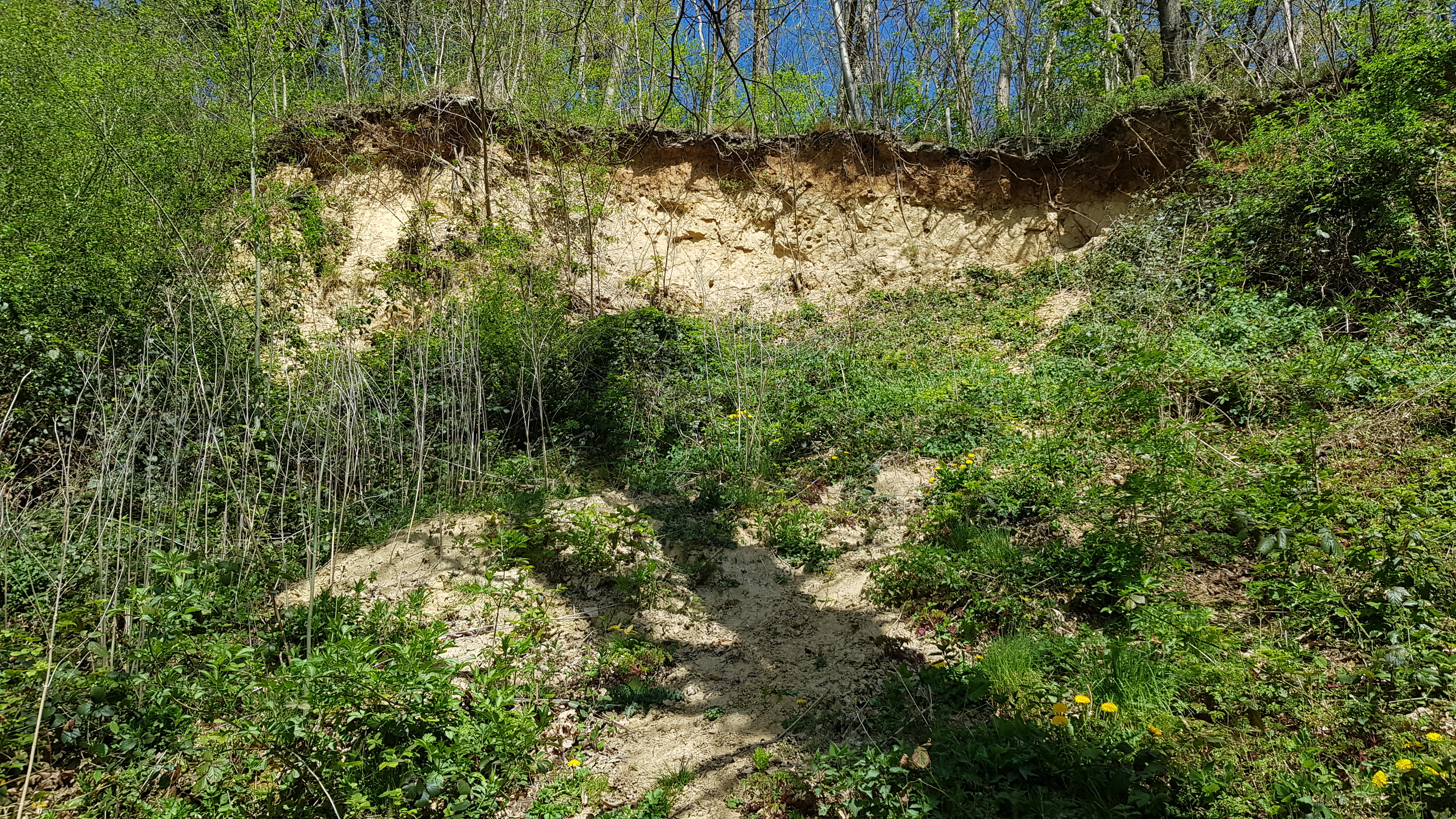 Groeve Waterval, Meerssen, Nederland